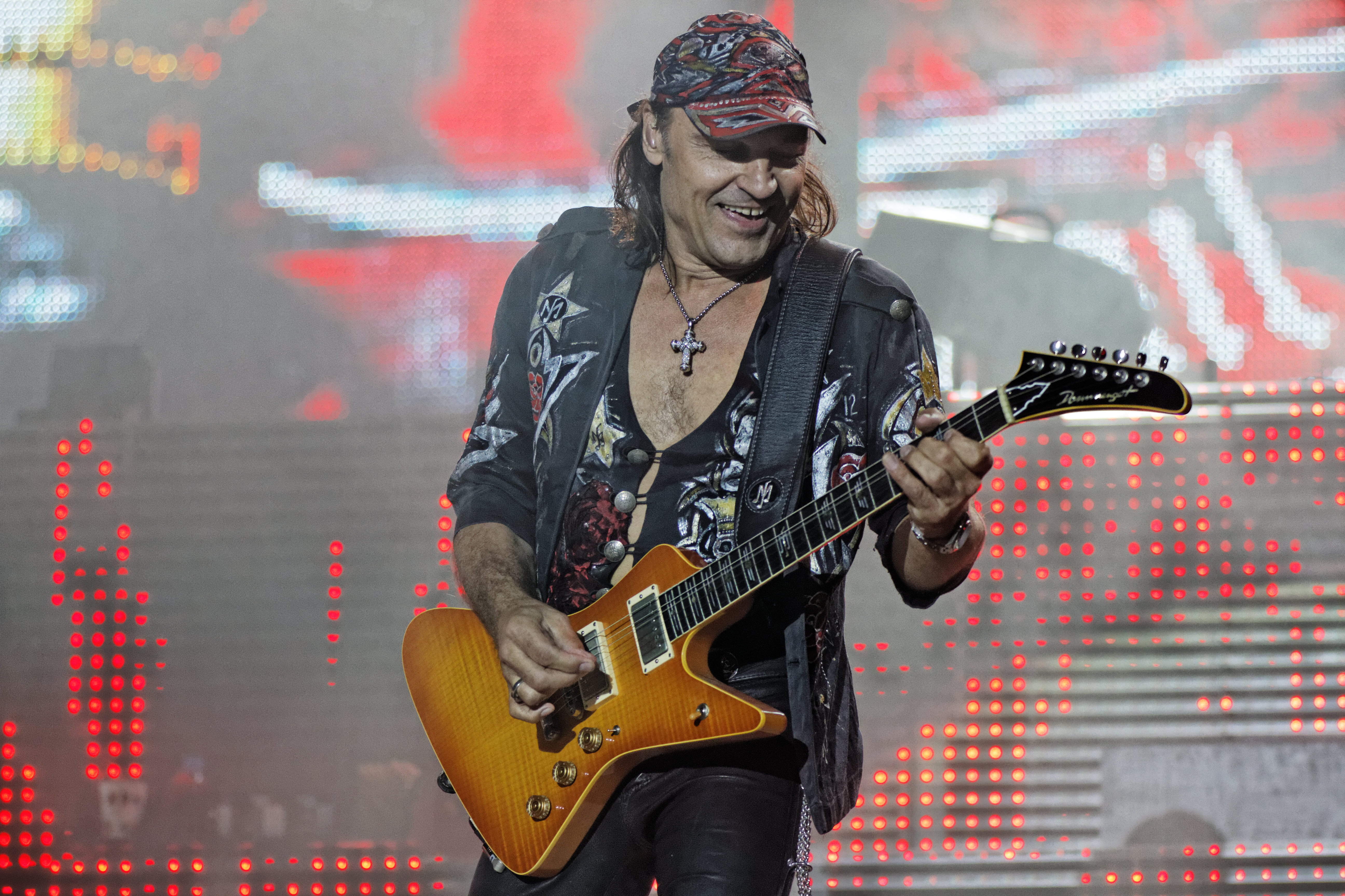 Scorpions en concert sur la grande scène lors de la fête de l'Humanité 2014.